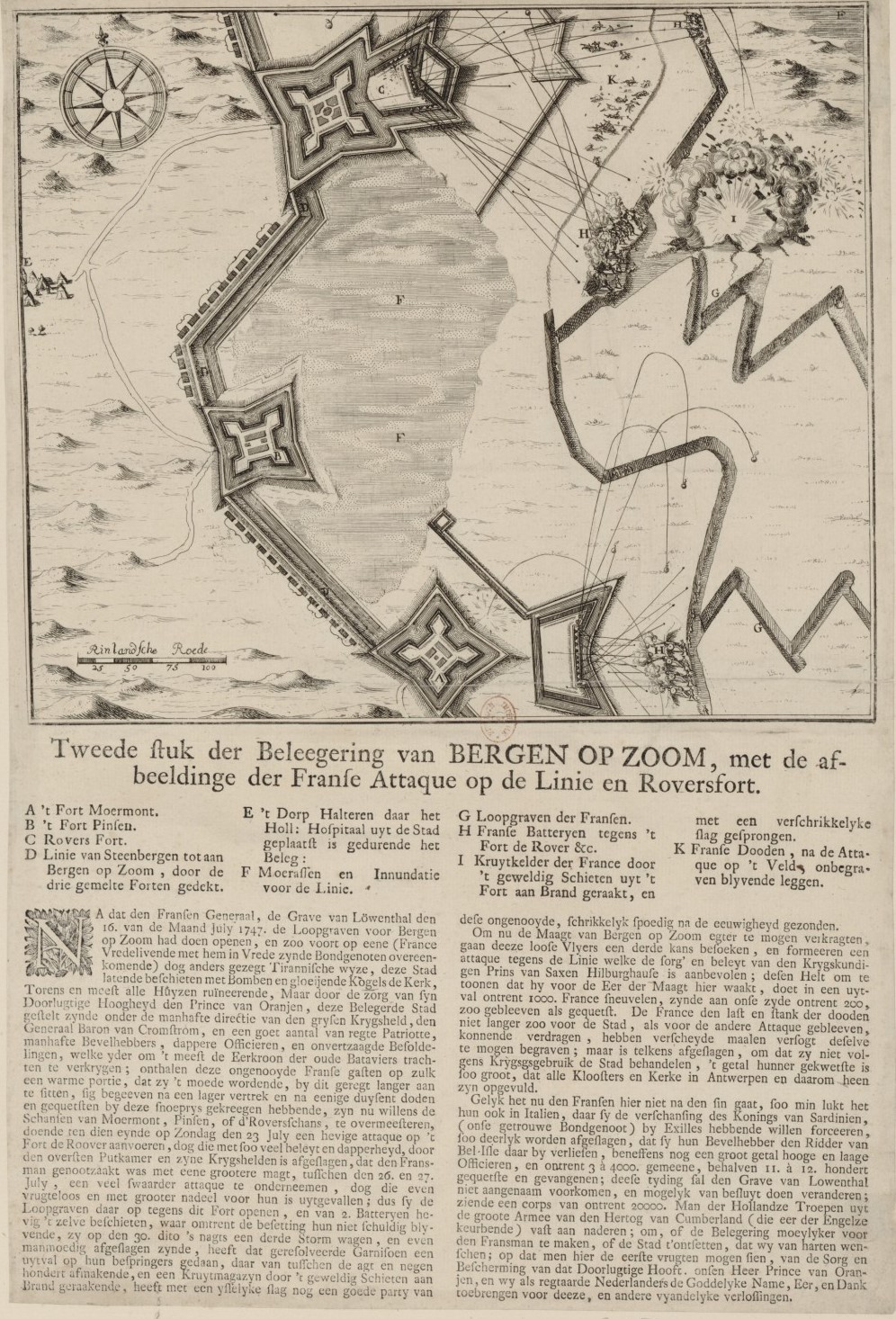 Plan commenté en néerlandais du siège, par l'armée française, de la ville fortifiée de Bergen-op-Zoom, en 1747. Guerre de Succession d'Autriche.